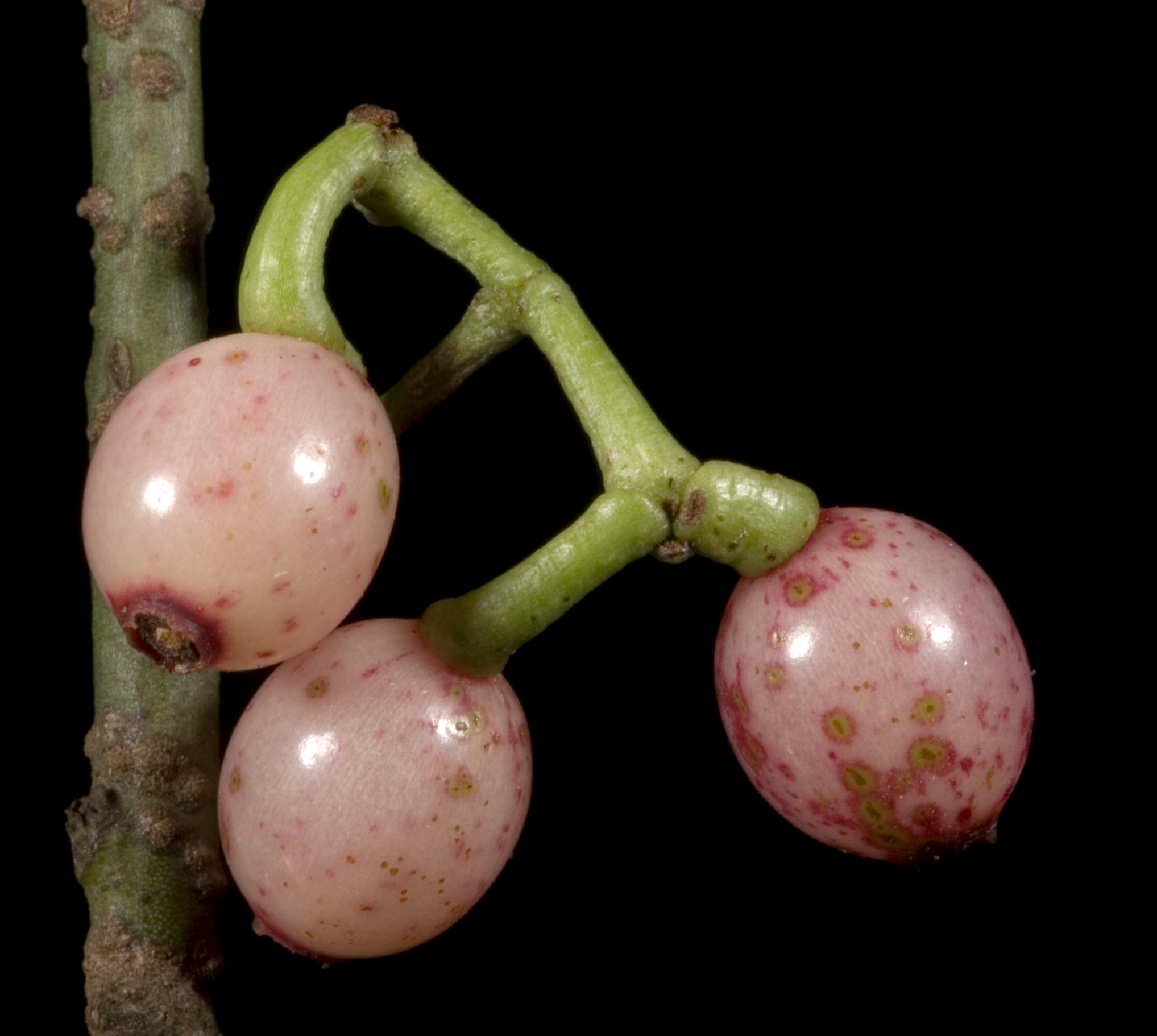 KRT3172 Amyema preissii